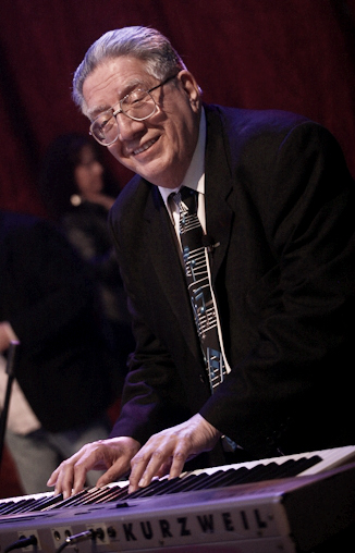 Valentín Trujillo en la Cumbre Guachaca 2013.